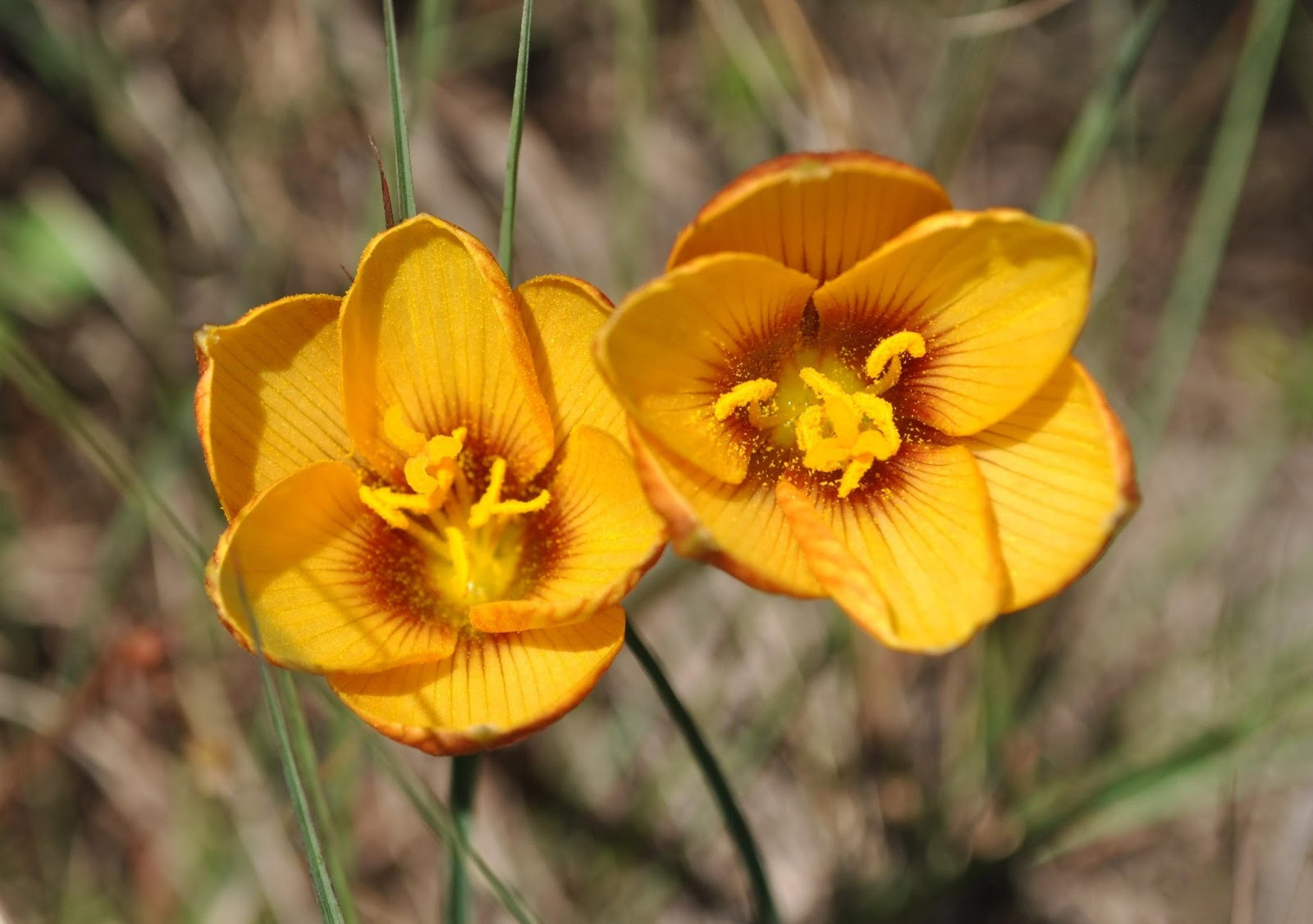 Habranthus tubispathus. Amaryllidaceae.Fotos tomadas al márgen de la Ruta 55 y en suelo rocoso al margen del Lago de Palmar, departamento de Soriano, Uruguay.